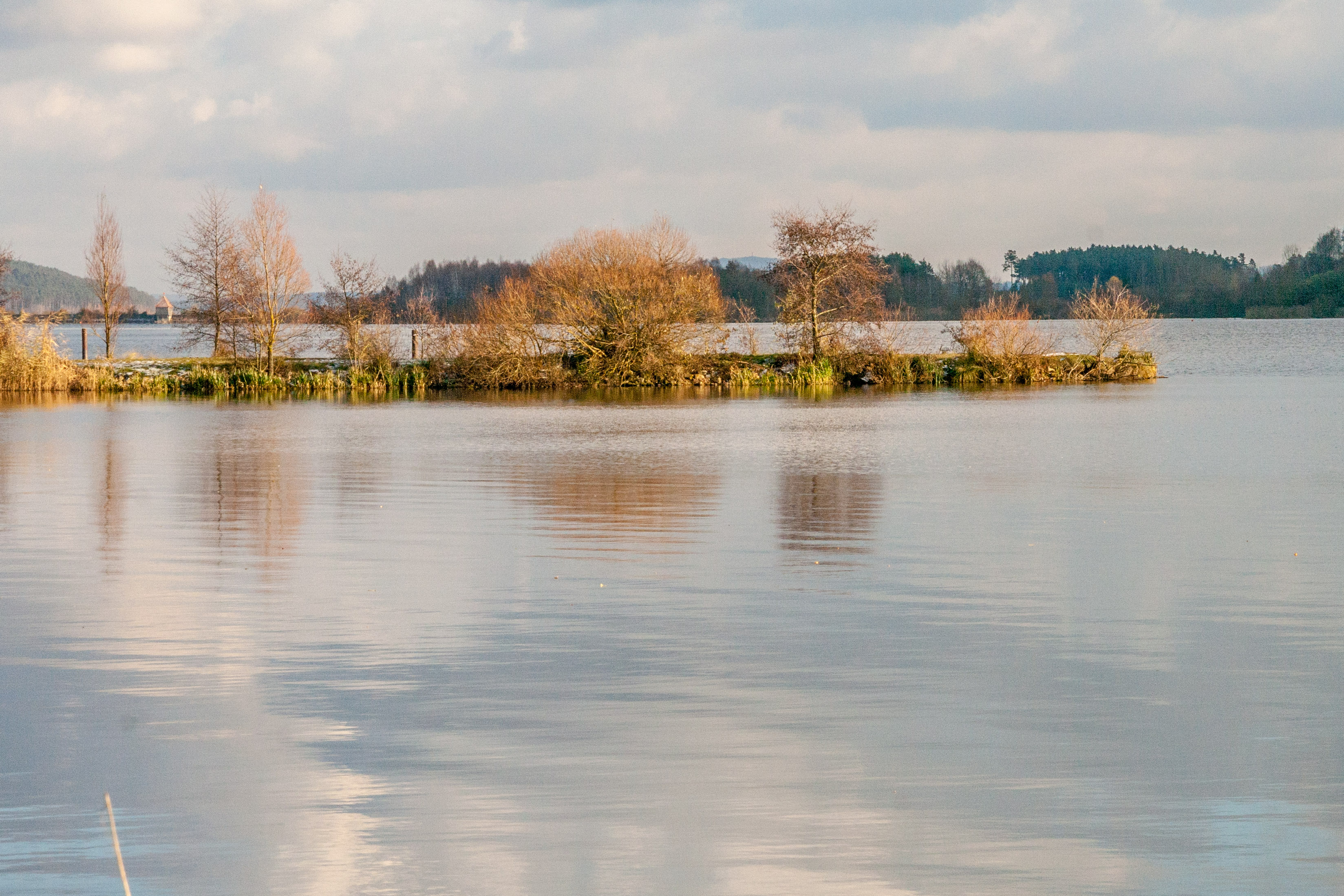 Kleiner Brombachsee, Südufer nahe Badestrand